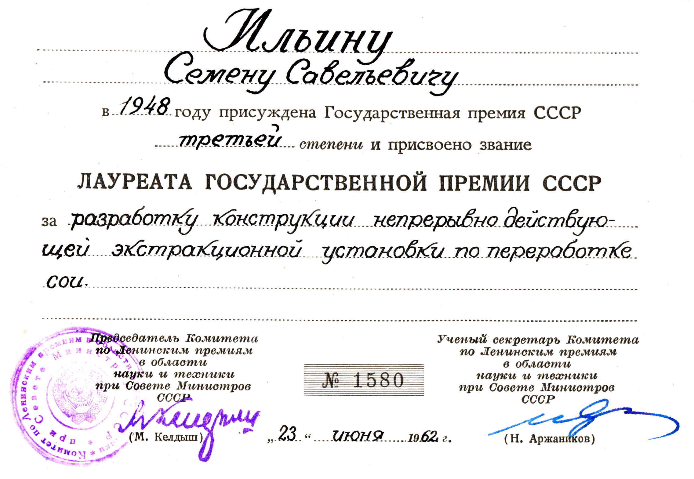 Свидетельство лауреата государственной премии СССР. Выдано в замен Свидетельства лауреата Сталинской премии 1948 г.